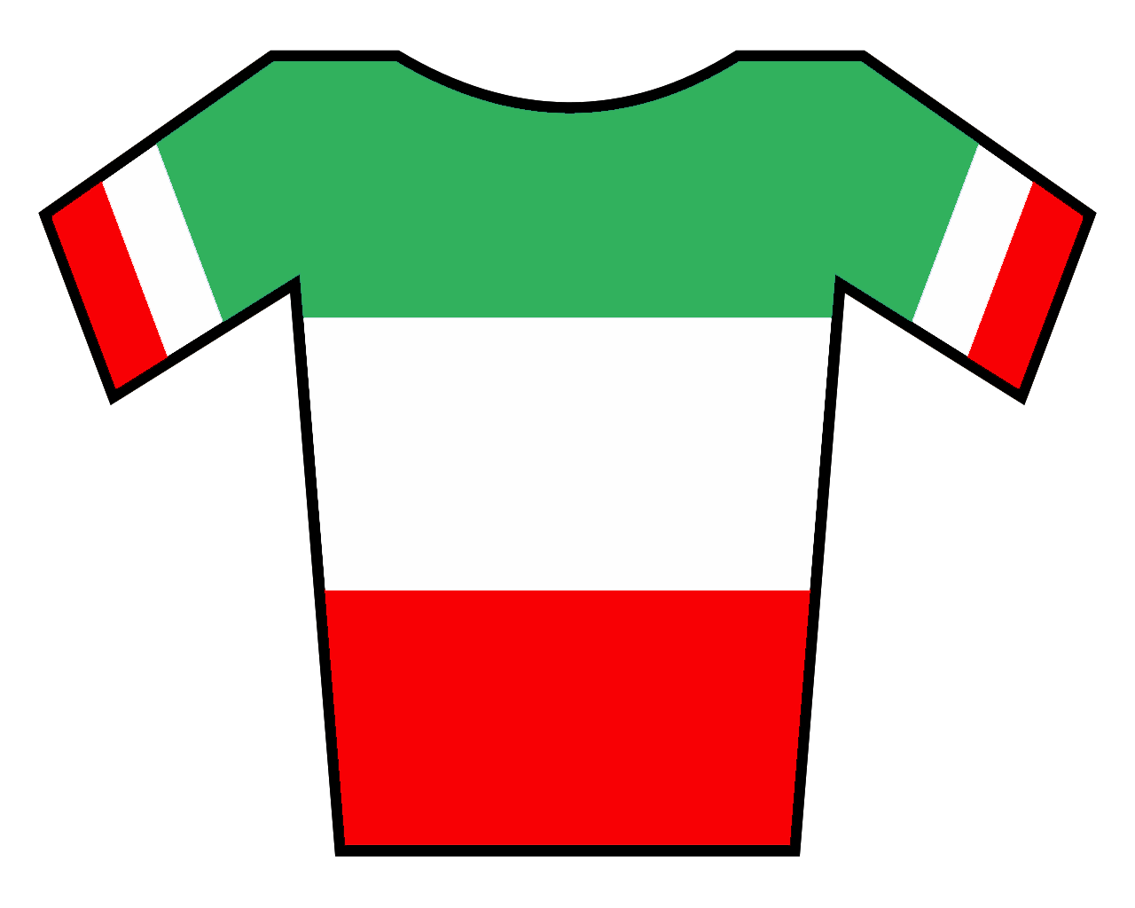 Maillot de Italia